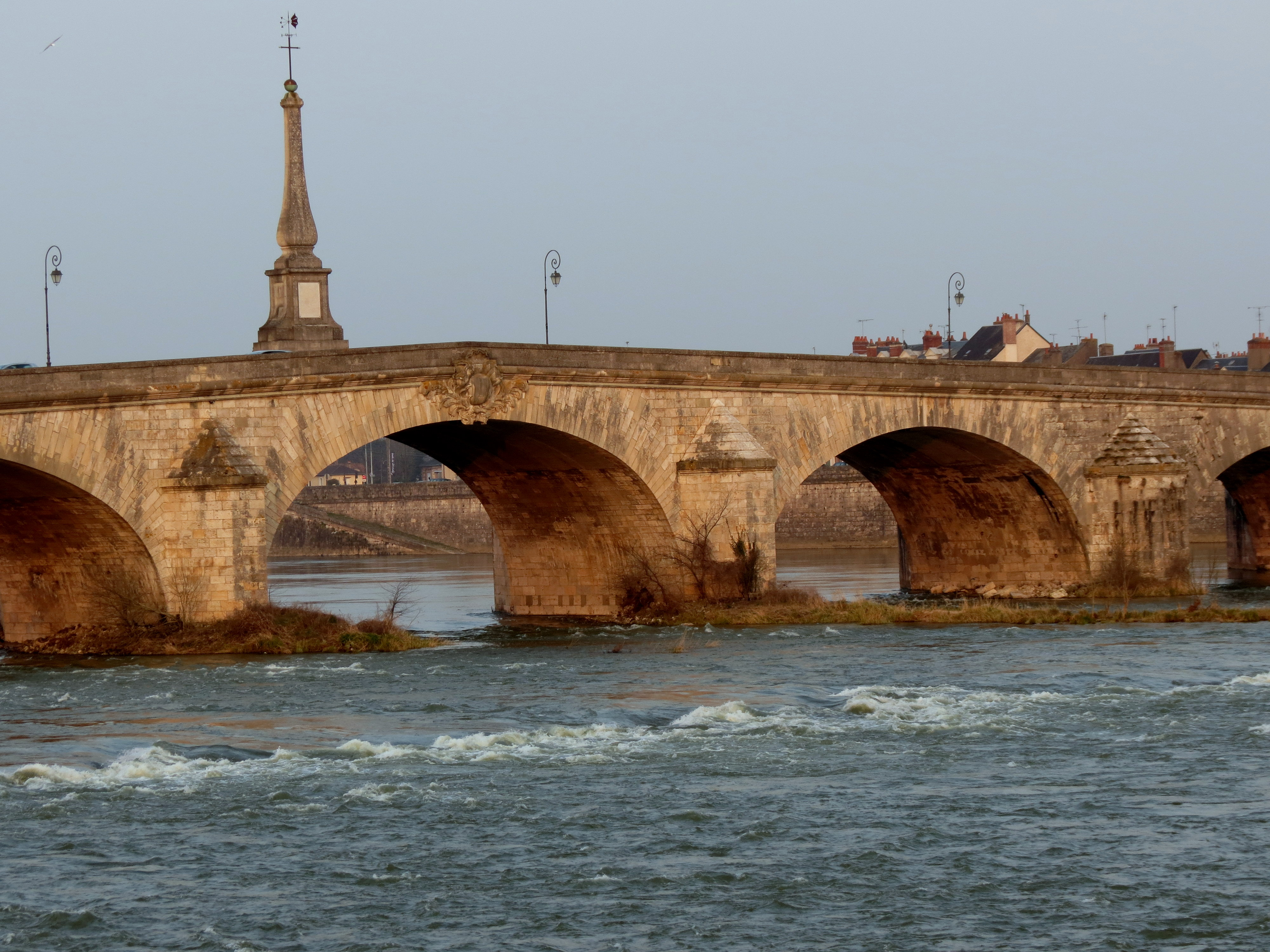 Les châteaux de la Loire.